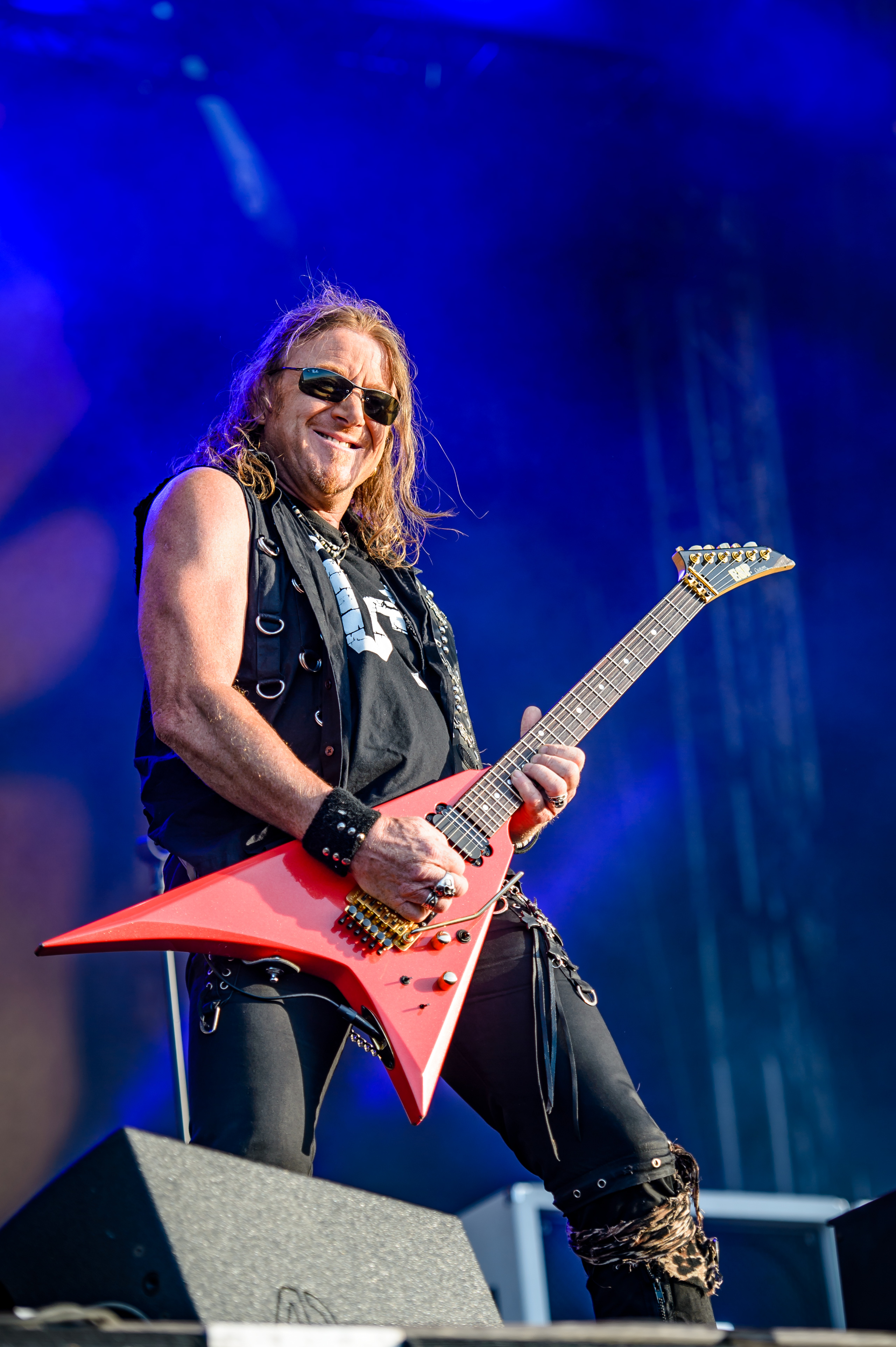 'RockHarz Open Air 2016; Ballenstedt': 'Gamma Ray'